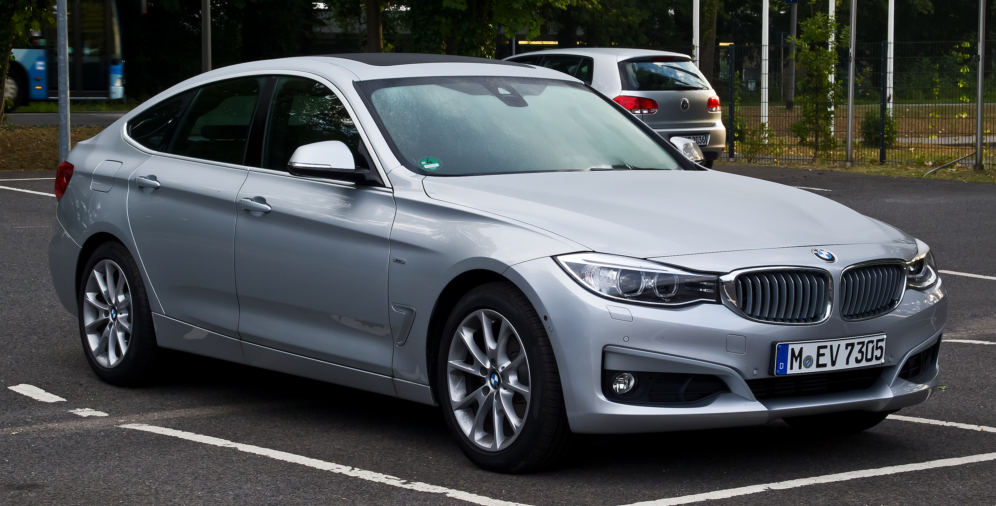 BMW 318d GT Modern Line (F34)